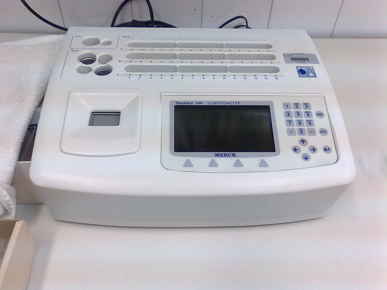 Egy luminométer.